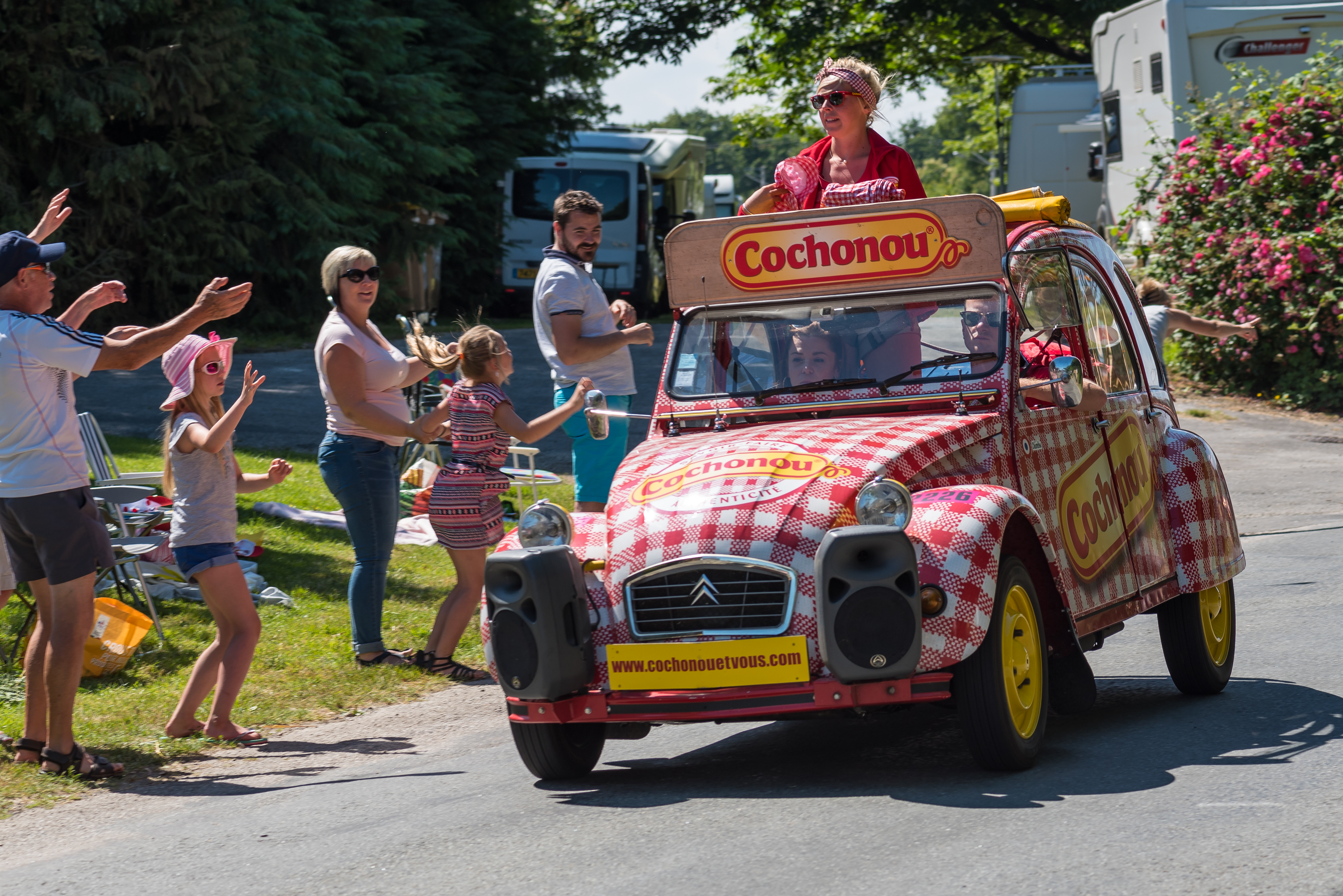 Cochonou Citroen 2CV. Tour de France 2018, St Mayeux